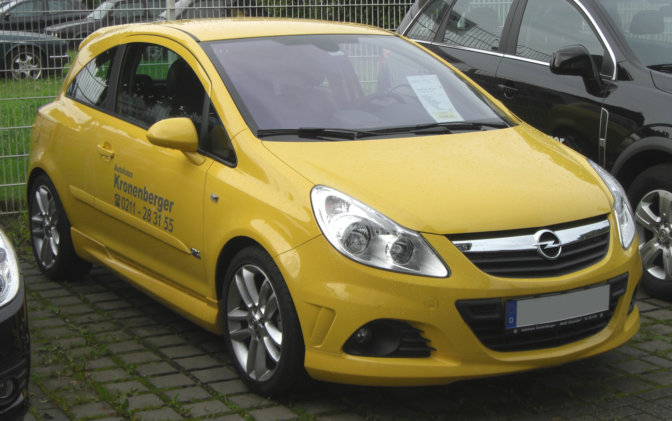 Opel Corsa D mit OPC-Line-Paket